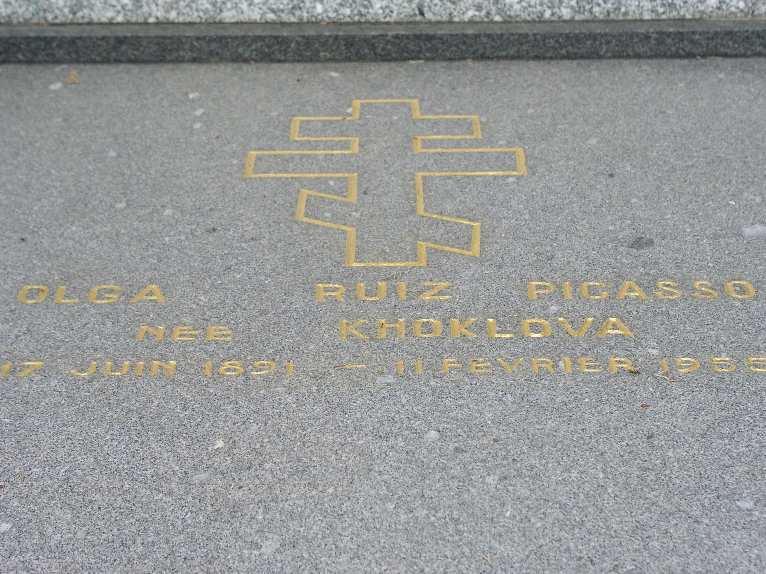 Picasso, Olga Ruiz, geborene Khoklova, Le Grand Jas, Cannes